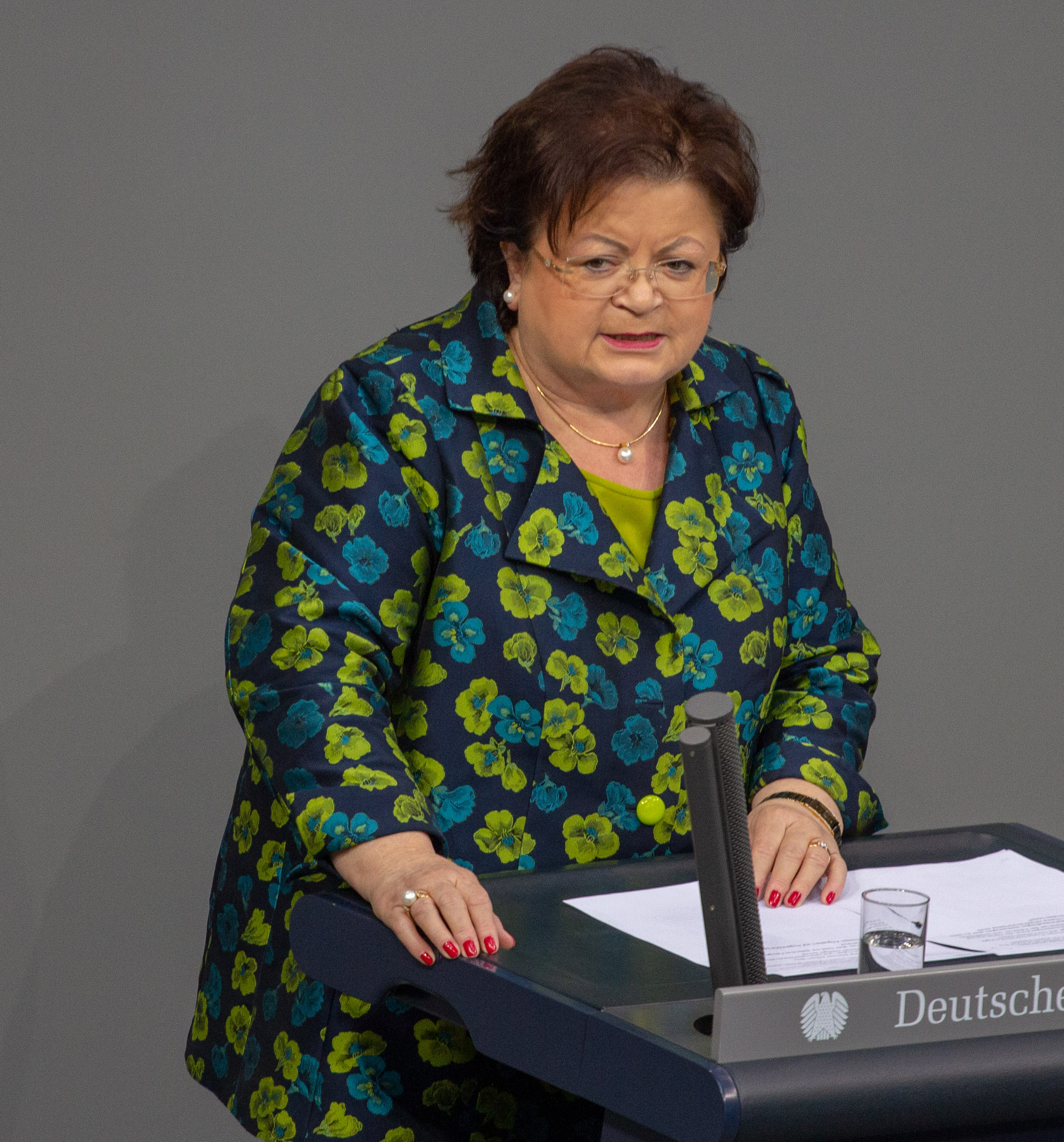 Anita Schäfer, Mitglied des Deutschen Bundestages, während einer Plenarsitzung am 12. April 2019 in Berlin.